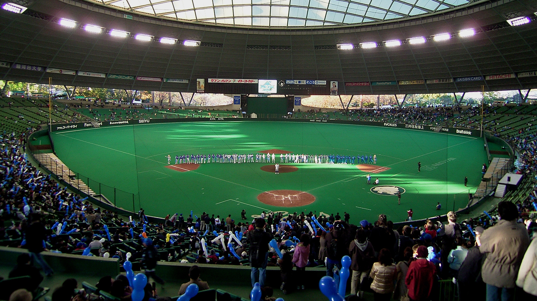 professional baseball team in Japan's Pacific LeagueSaitama Seibu Lions in Seibu Dome location 2135 Kami-Yamaguchi, Tokorozawa-City, Saitama 日本プロ野球 パ・リーグに加盟する埼玉西武ライオンズ。撮影場所西武ドーム 2007年11月23日ファン感謝デー 所在地 埼玉県所沢市大字上山口2135 所沢移転30周年を迎える2008年1月1日に西武ライオンズから埼玉西武ライオンズへ球団名称が変更になることをファンへ報告する渡辺新監督。